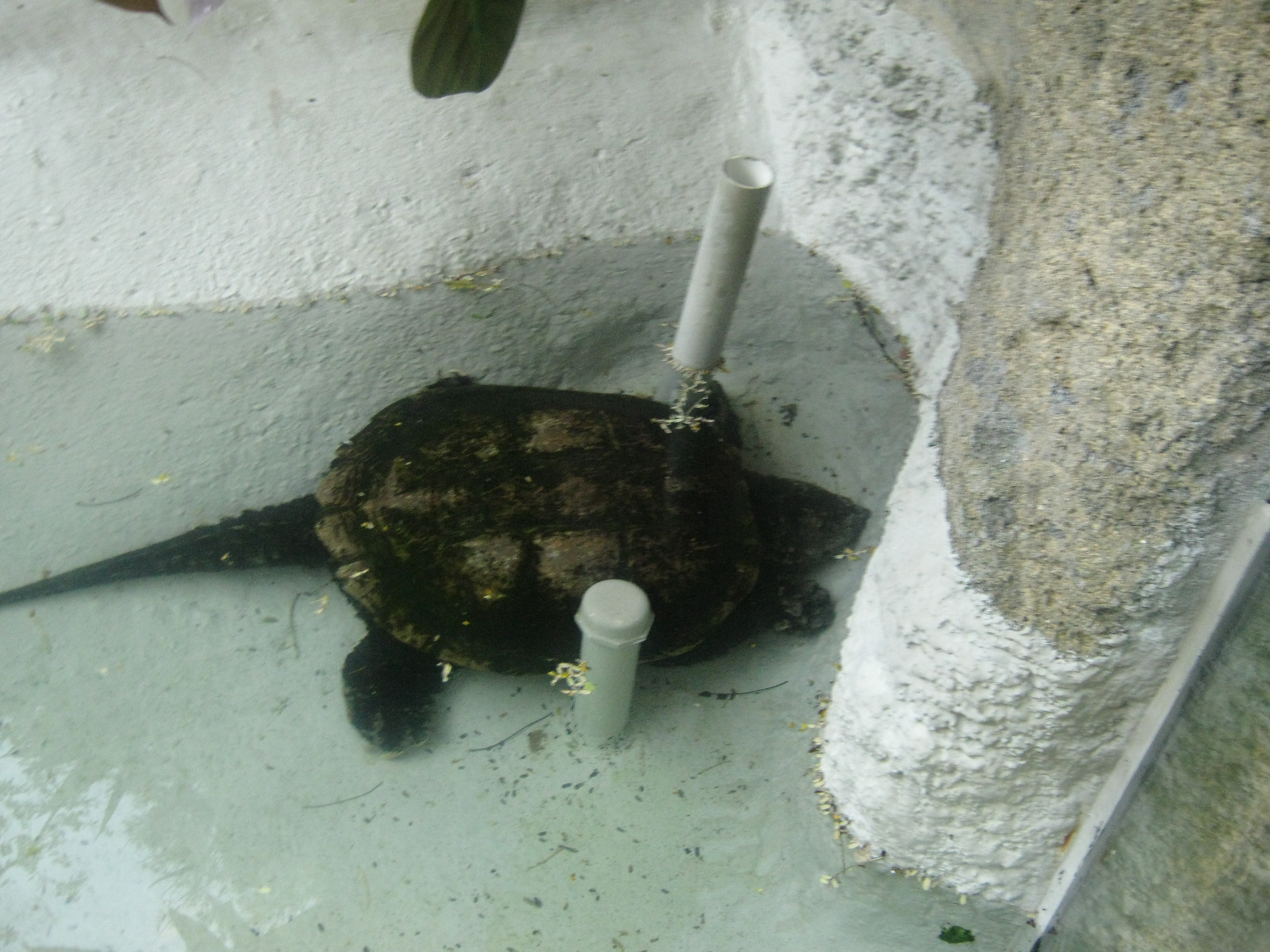 Zoológico de Cali